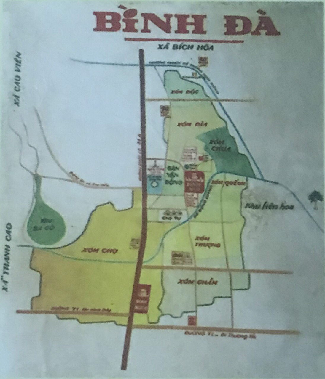 Bản đồ Bình Đà